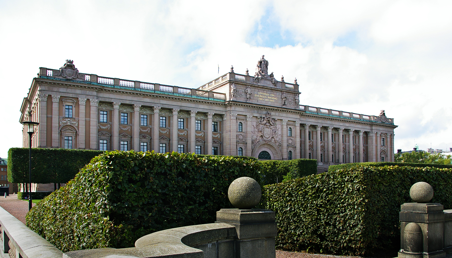 Riksdagshuset i Stockholm